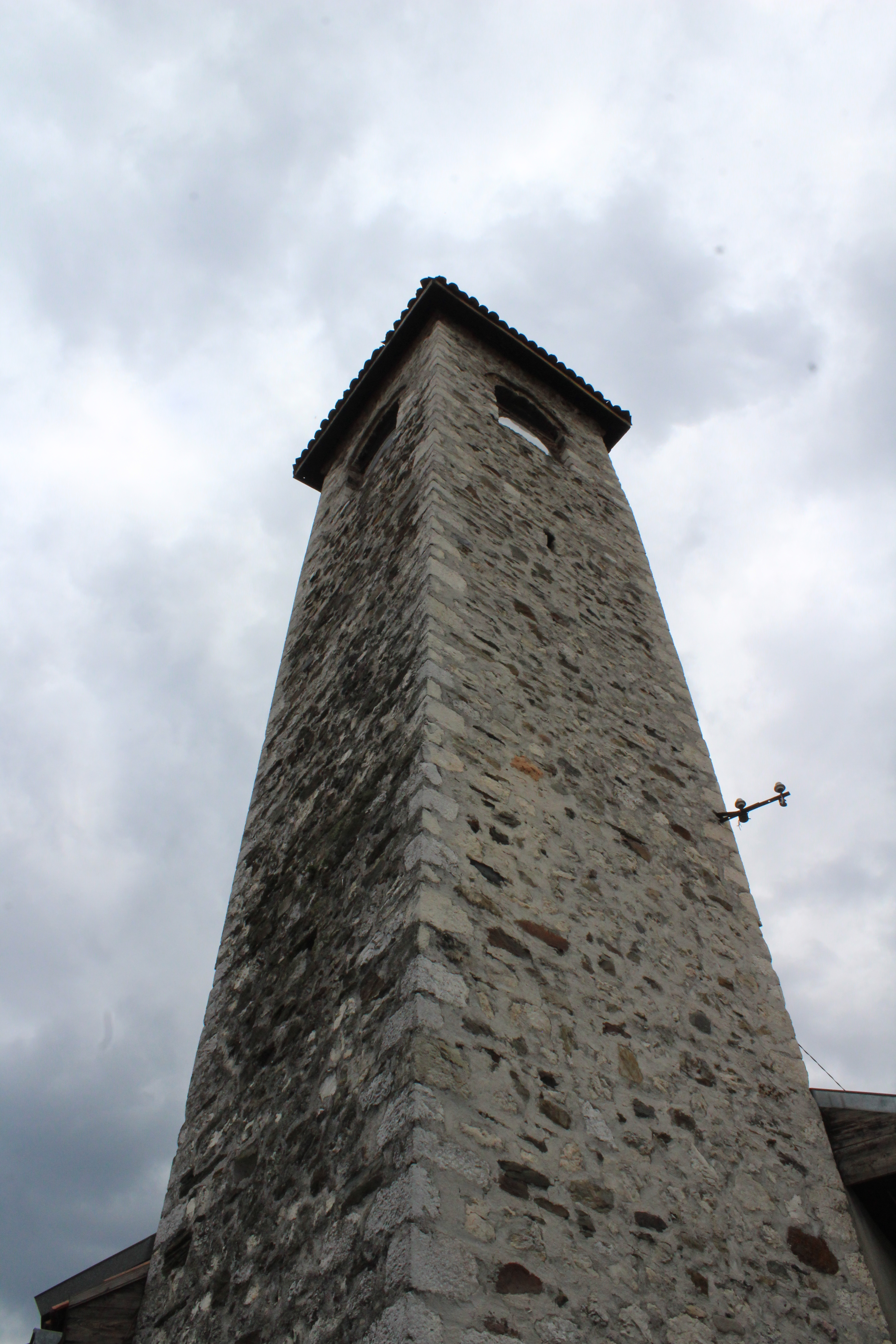 Сахат кула Мехмед-паше Кукавице, Фоча ID добра: NKD722